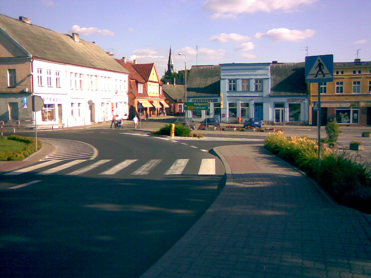 Rynek w Szubinie